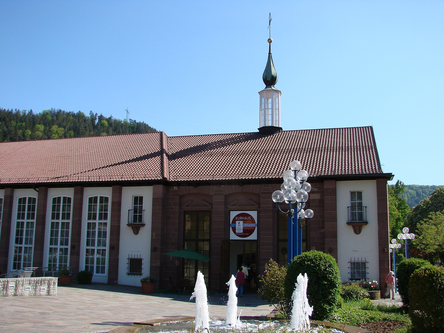 Bad Liebenzell, spa house